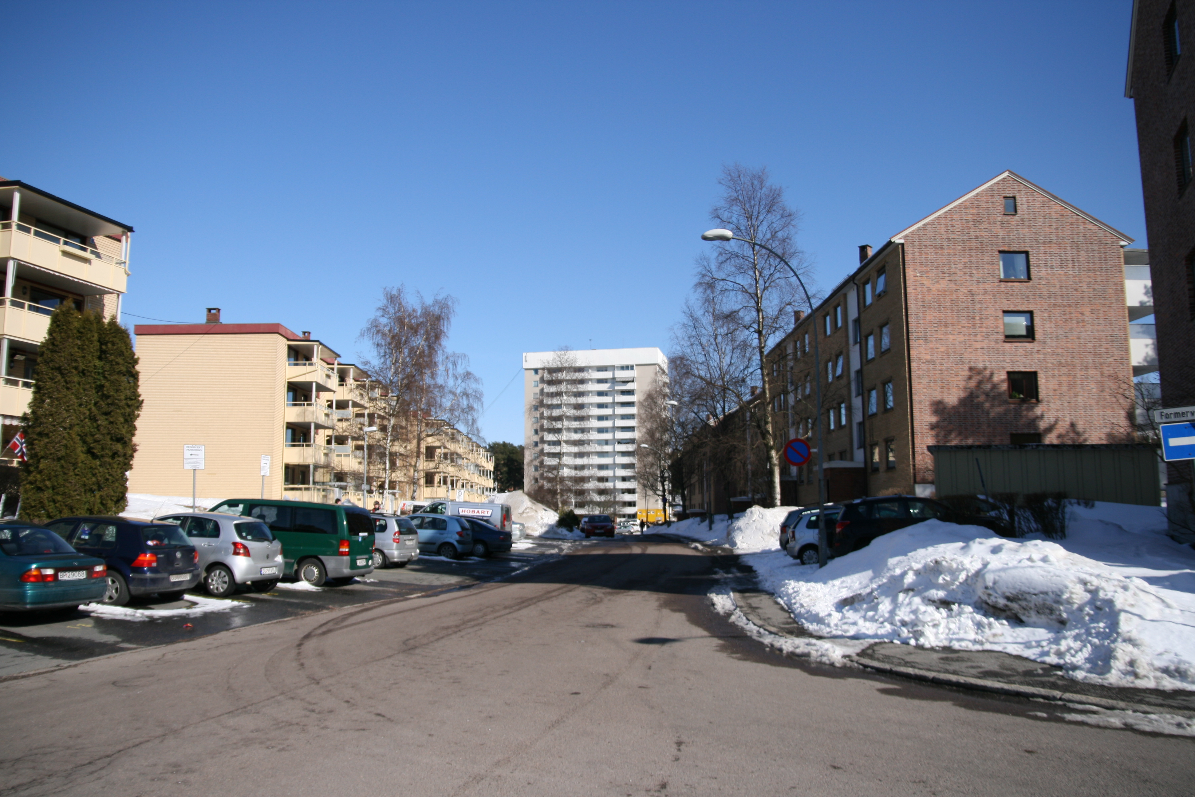 Filerveien på Oppsal i Oslo, sett fra krysset med Formerveien og mot Vetlandsveien. Til venstre Filerveien 10-18, i midten Vetlandsveien 66, til høyre Filerveien 7-17.